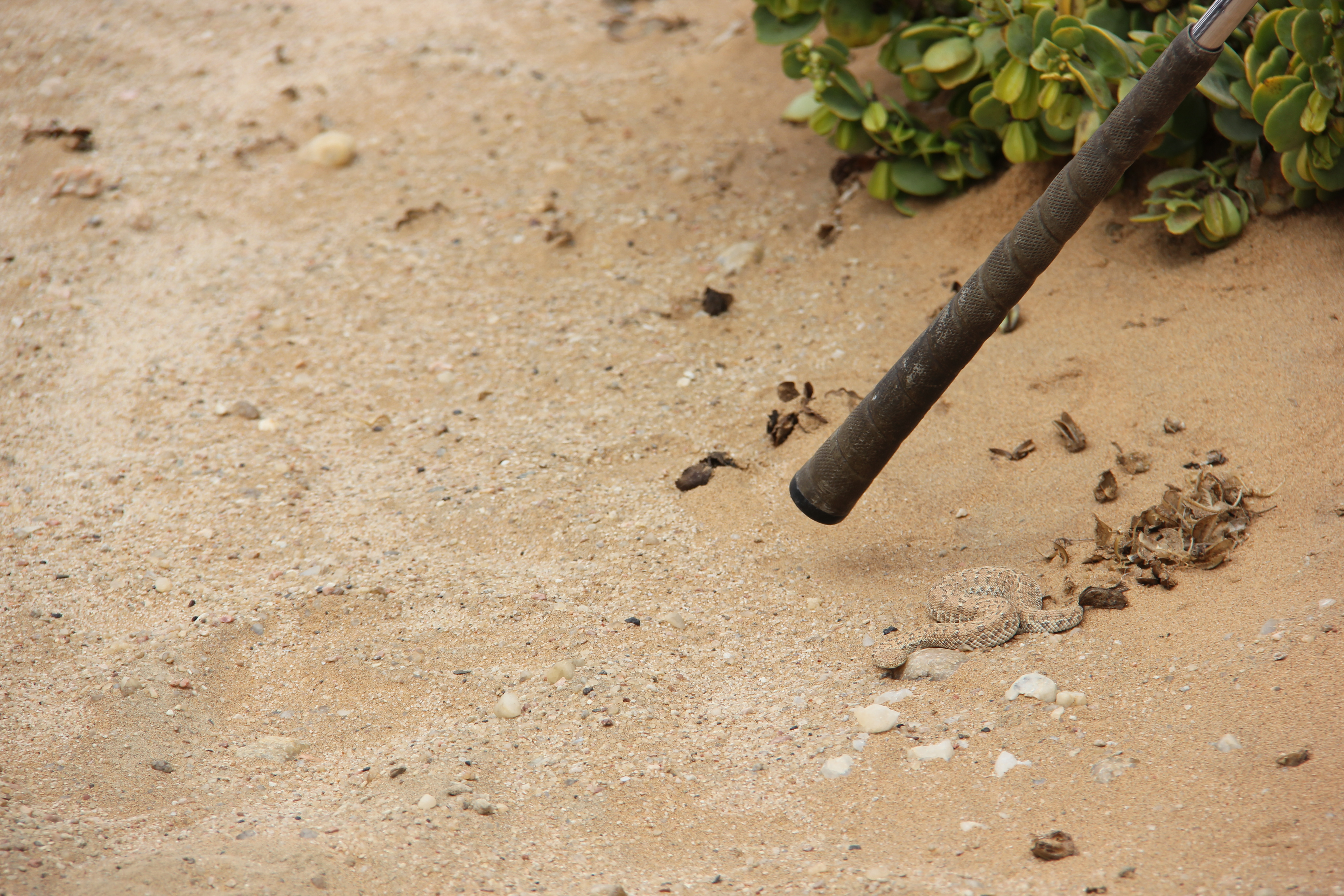 Sidewinder